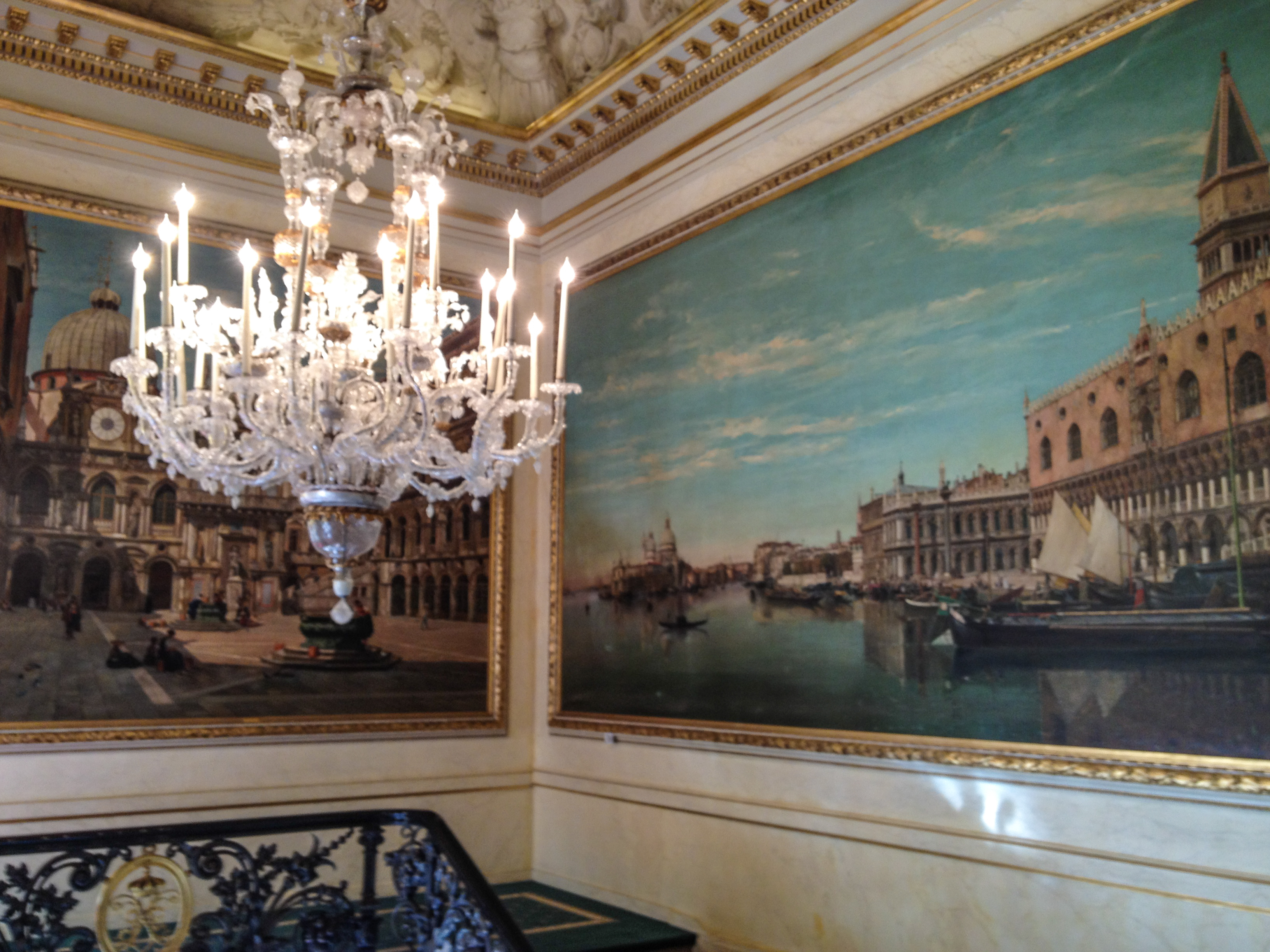 The Royal Palace of Brussels (Dutch: Koninklijk Paleis van Brussel